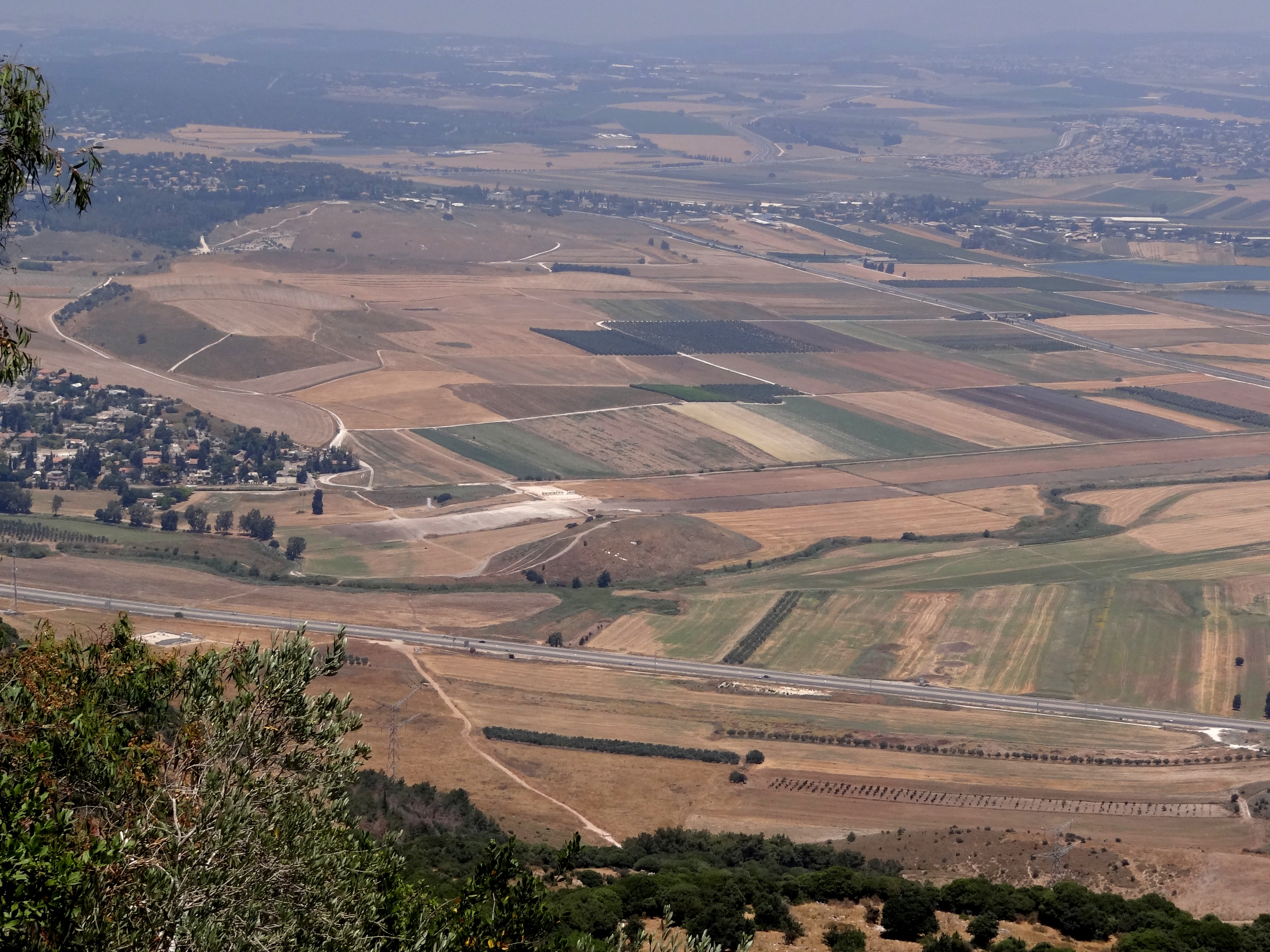 Tel Kashish, Archaeology site on north of Israel תל קשישי אתר ארכאולוגי בעמק יזרעאל קרוב לתל יקנעם, למרגלותיו עובר נחל קישון. מיקומו קרוב לשכונת קריית חרושת בקריית טבעון התל במרכז מימין לבתי קריית חרושת